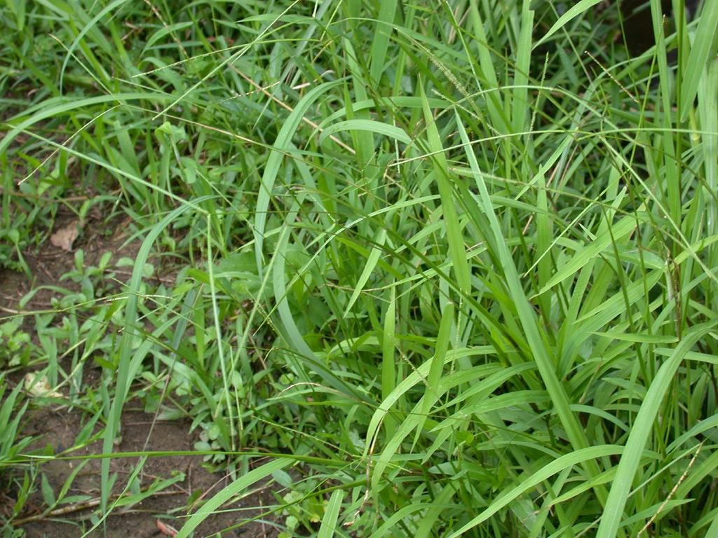 Paspalum conjugatum (Poaceae)：オガサワラスズメノヒエ Locarity:Okinawa island Japan 沖縄県沖縄本島中部 2008/08/10